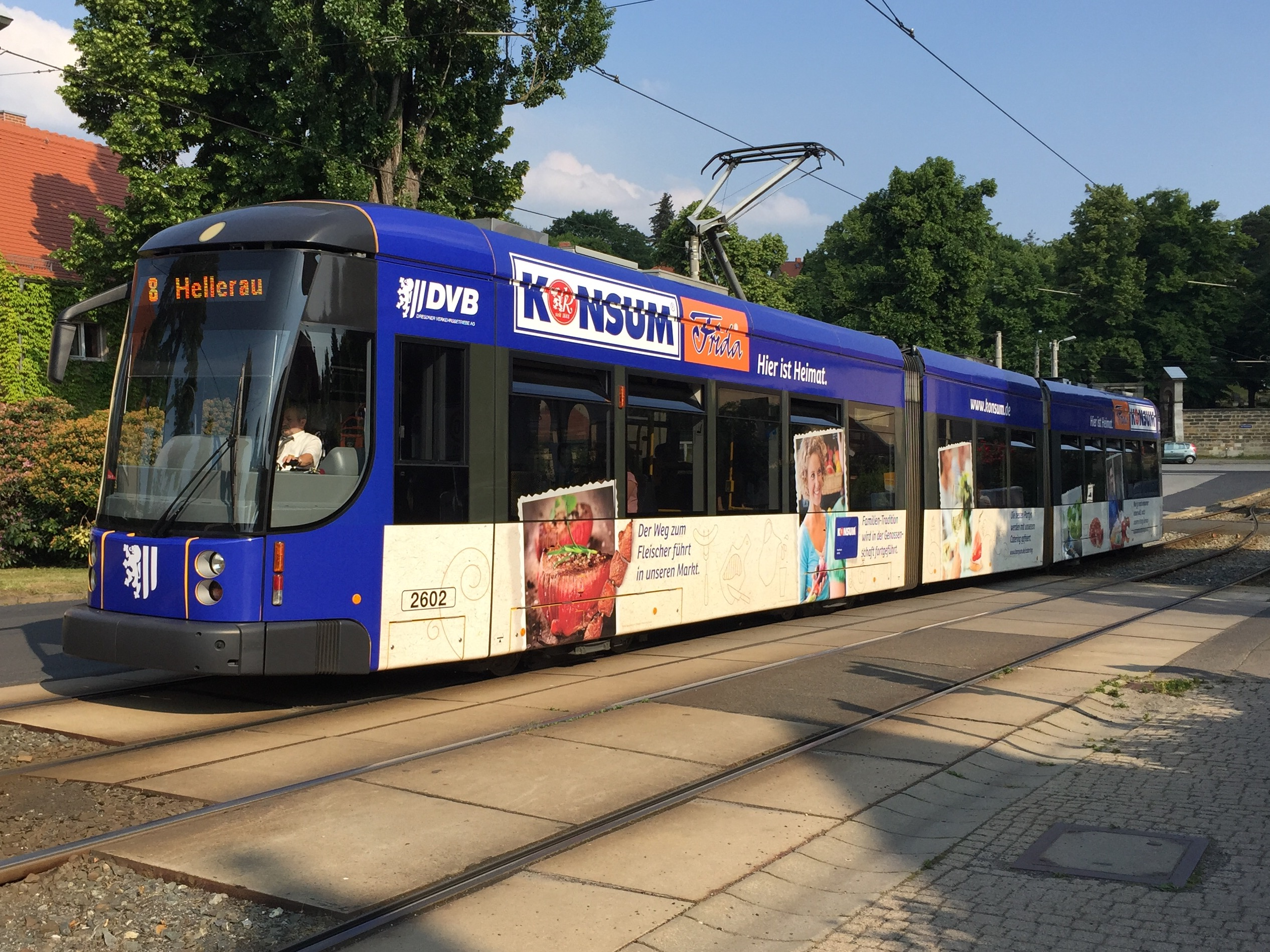 Straßenbahnwagen 2602 Dresden